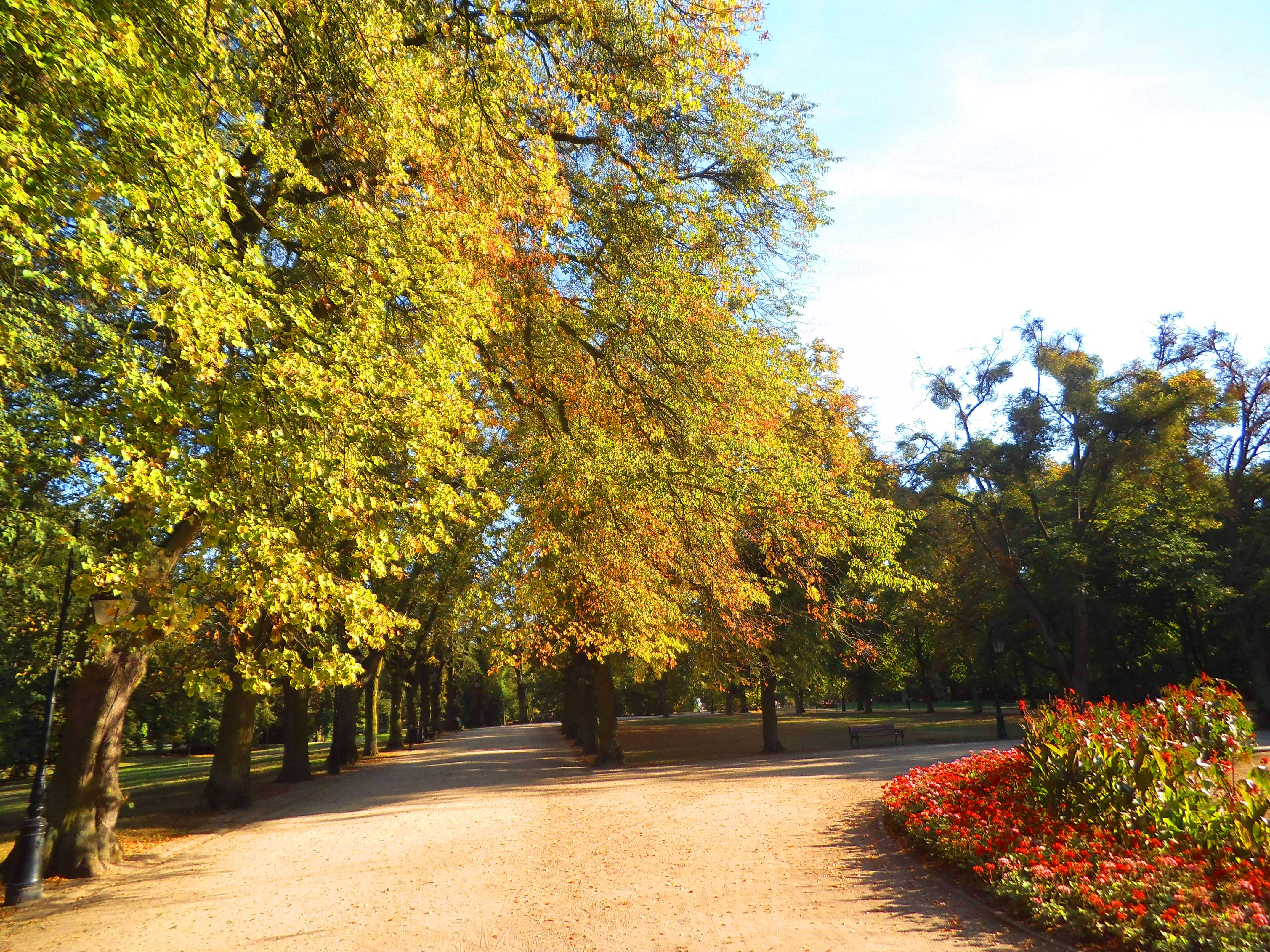 Park Tężniowy w Ciechocinku